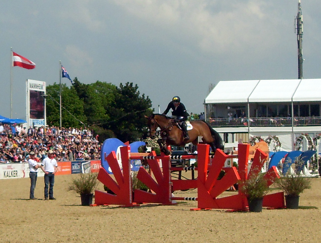 50. Maimarkt-Turnier, Oleg Krasyuk mit Nobylis